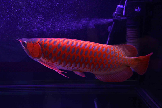 Basa Jawa: Iwak Arwana ABang ik....